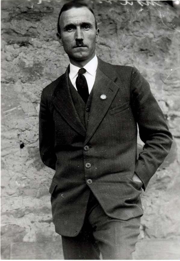 Otto Bender (17. Dezember 1897 in Eichtersheim; 27. Mai 1988), deutscher Politiker (NSDAP), NSDAP-Kreisleiter im Amtsbezirk Wiesloch, von 1933 bis 1945 Bürgermeister der Stadt Wiesloch, 1933 Mitglied des Landtages der Republik Baden, 1940 Chef der Zivilverwaltung in Bischheim Bischheim (Bas-Rhin)